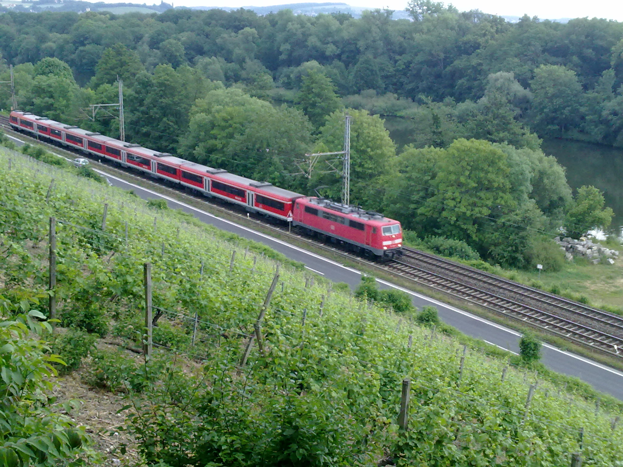 Blick von Peterstirn